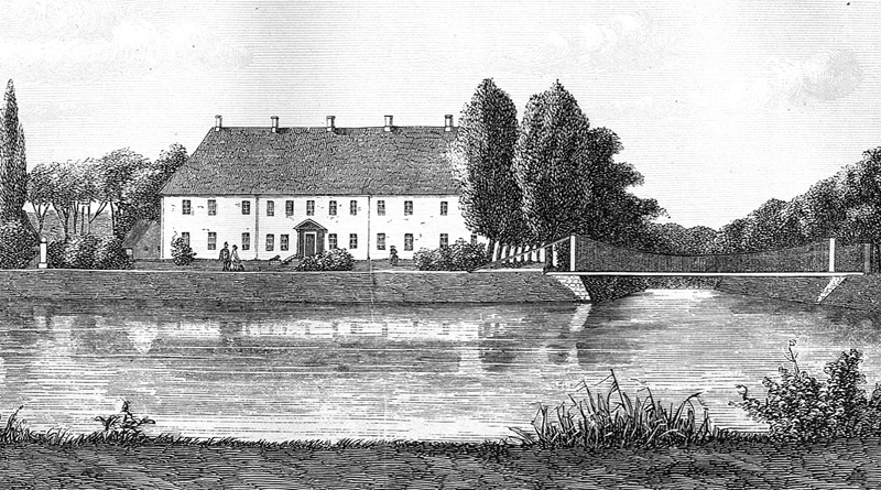 Brahesborg er fra slutningen af middelalderen, da en af Odense stifts regnskabsprovster hade sin bolig i Assens. Her lå også en hovedgård som kaldtes Bisbo eller Bispestolgaard og formodentlig må have tilhørt Odense bispestol. Gården ligger i Gamtofte Sogn, Båg Herred, Assens Kommune. Hovedbygningen er opført i 1638-1656